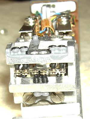 Das Bild zeigt die Kontakte vom kleinen schnellen Prüfrelais, diese Kontakte konnten innerhalb ein paar Millisekunden ansprechen.